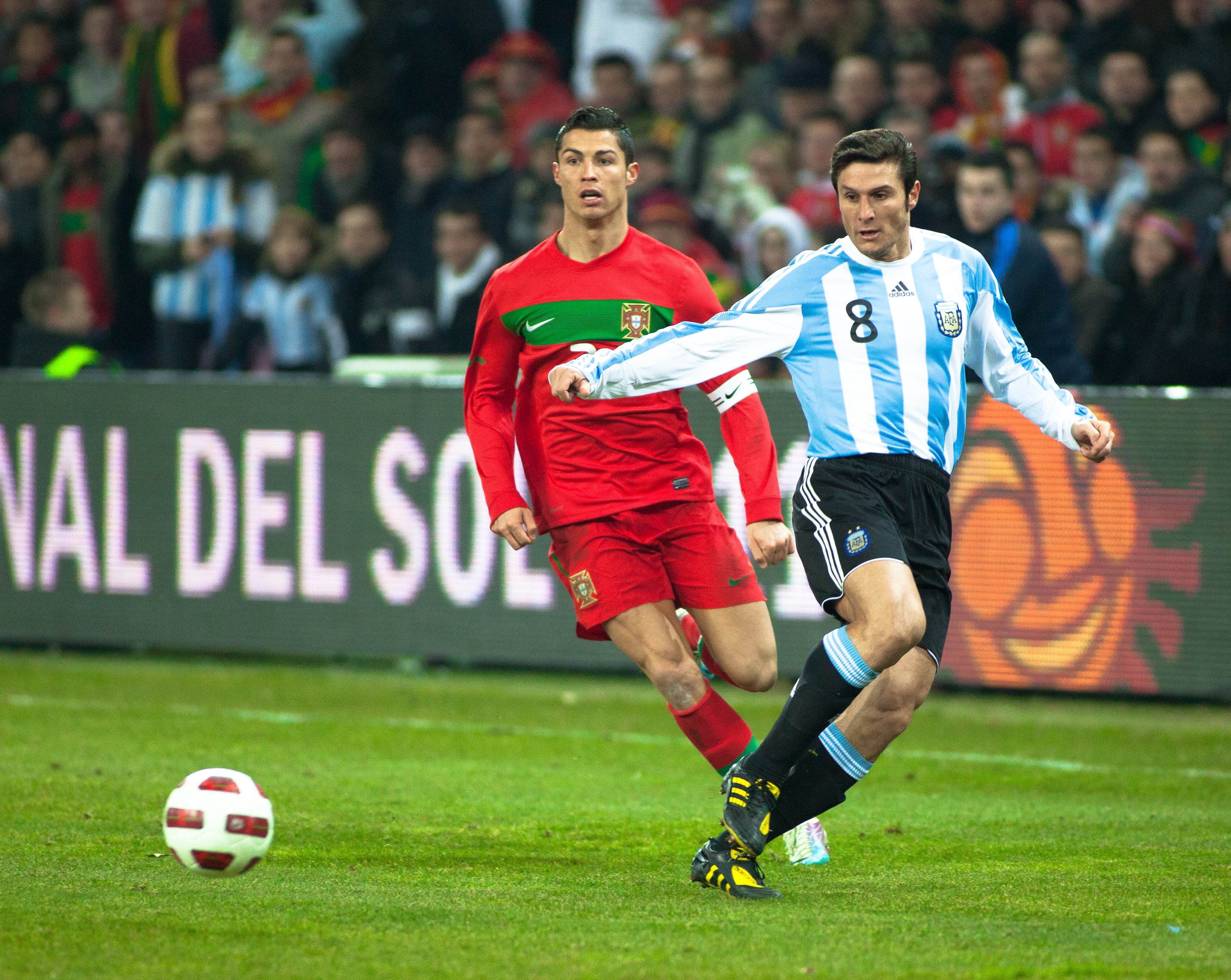 Javier Zanetti et Cristiano Ronaldo lors d'un match amical Argentine - Portugal à Genève.